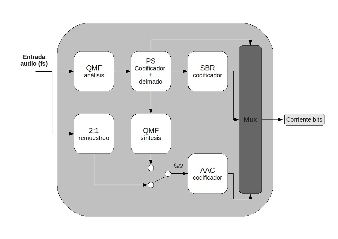 Diagrama de bloques de un codificador HE-AAC